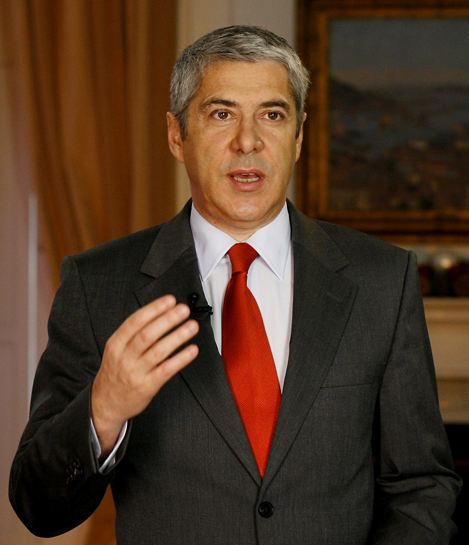 José Sócrates, lors de son message de Noël, en 2008.